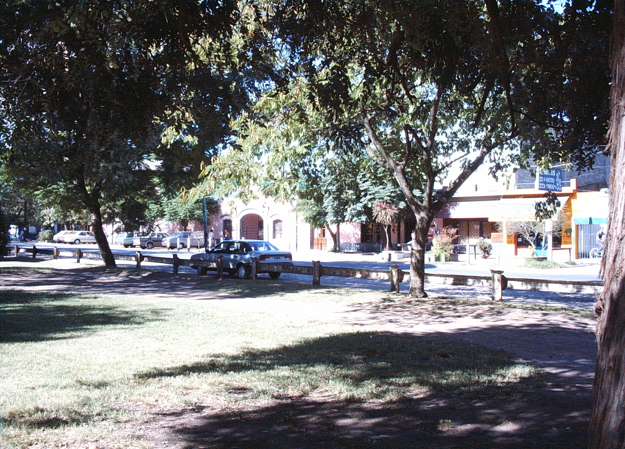 Vista parcial del parque de la Estacion de Ranelagh, anden Constitucion/Bosques.